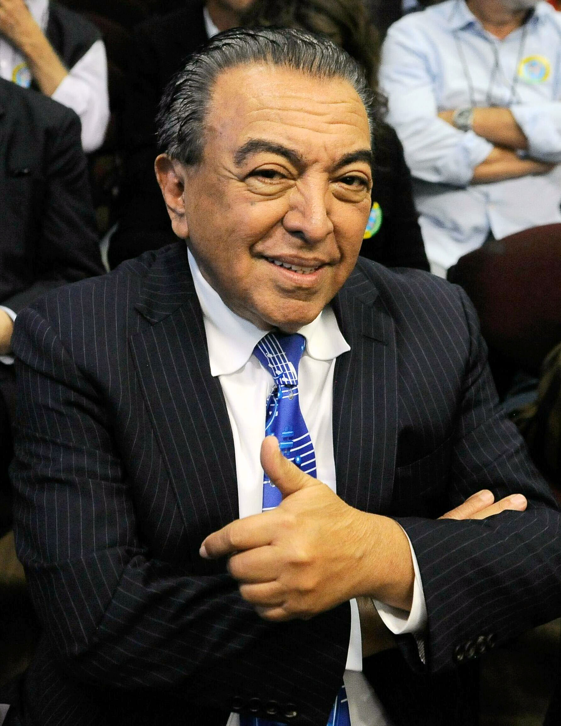 Mauricio de Sousa, criador da Turma da Mônica, homenageado na 17ª Bienal Internacional do Livro do Rio de Janeiro, participa da abertura no Riocentro.